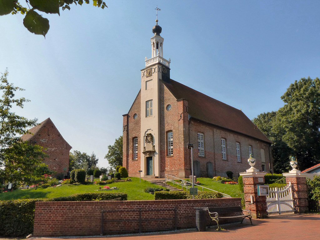 Die evangelisch-reformierte Accumer Kirche in Accum, Stadt Schortens, Landkreis Friesland